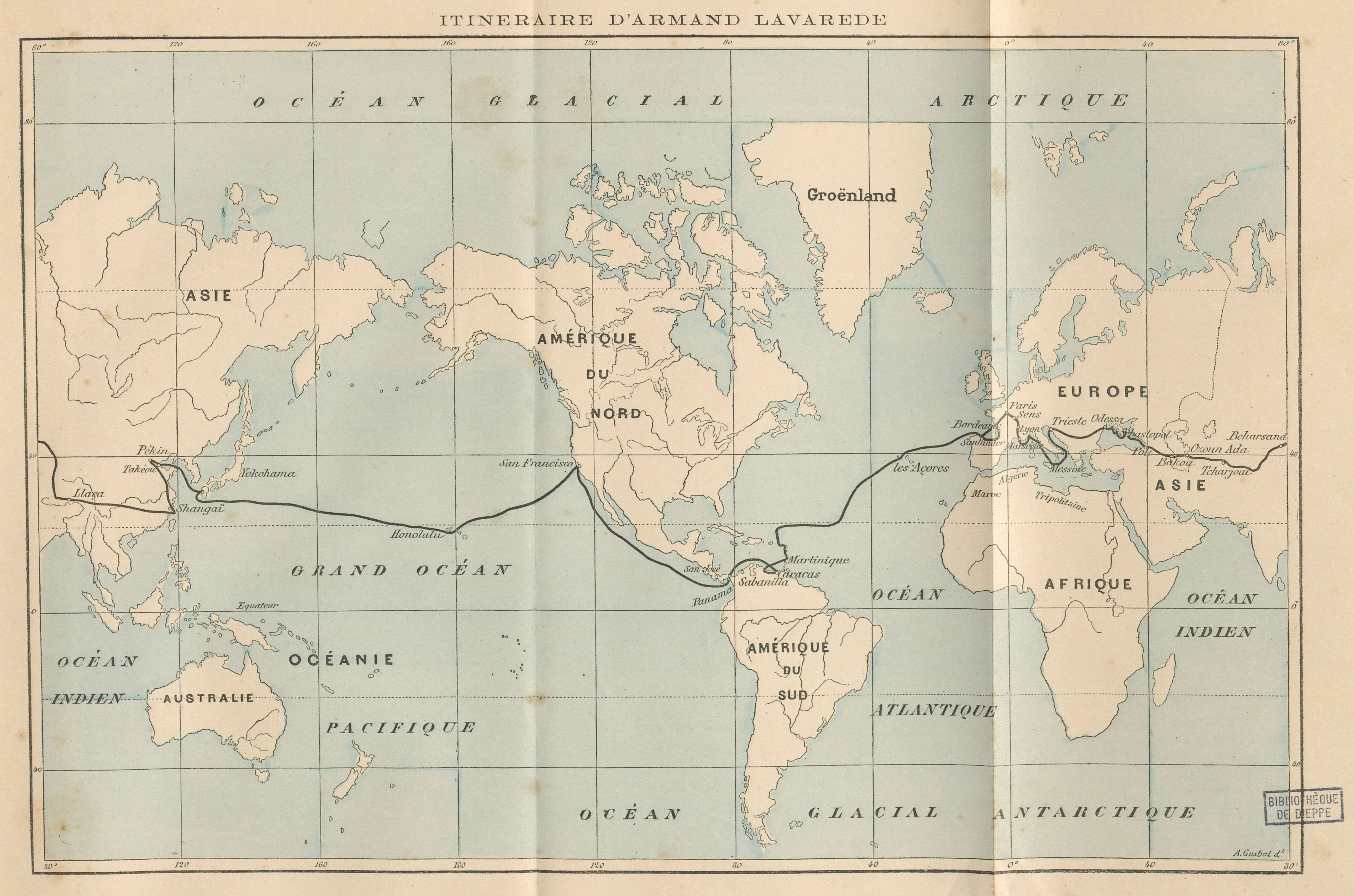 Carte montrant l'itinéraire de Lavarède autour du monde, en tête du roman de Paul d'Ivoi "Les Cinq Sous de Lavarède" (1894). La carte a été dessinée par A. Guibal.